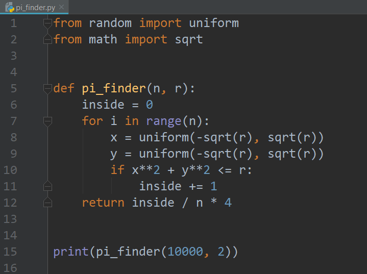 קוד בשפת פייתון המתאר חישוב פאי בעזרת שיטת מונטה קרלו.